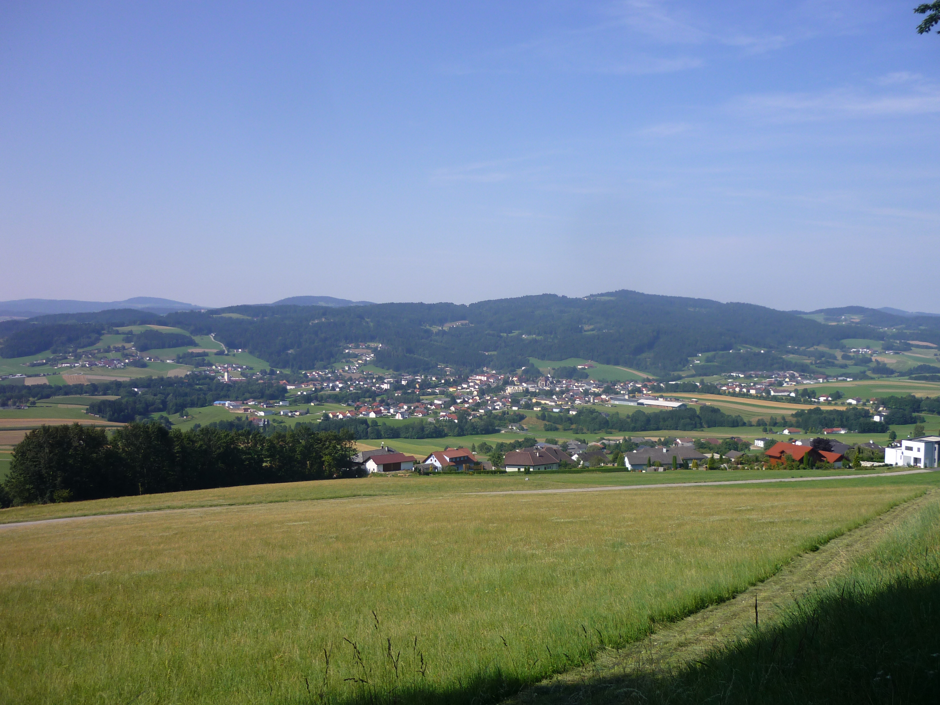 Aigen-Schlägl - Panorama von Haagerhof